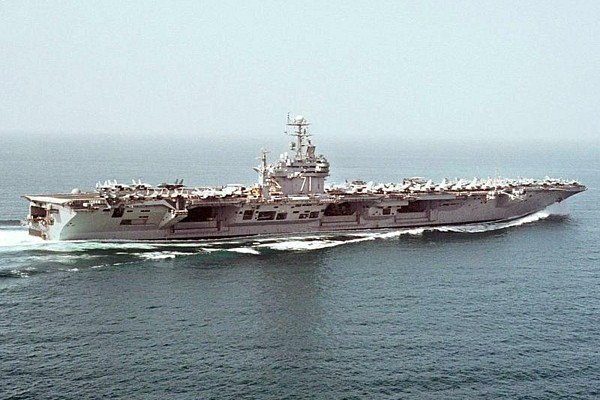 Official US Navy Photograph